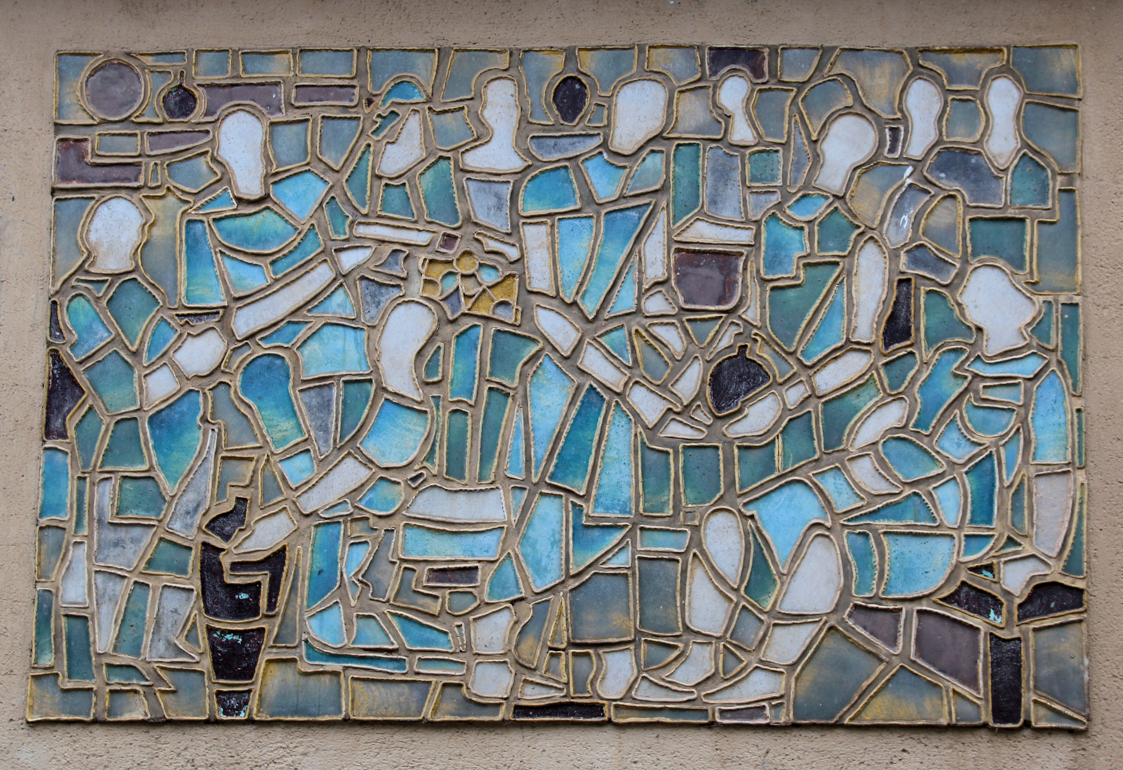 Keramisches Wandbild von Ludwig Zepner und Karheinz Schäfer "Hochzeit zu Kana" in Meißen